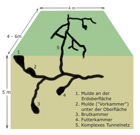 Schemazeichnung eines unterirdischen Baus der Gryllotalpidae